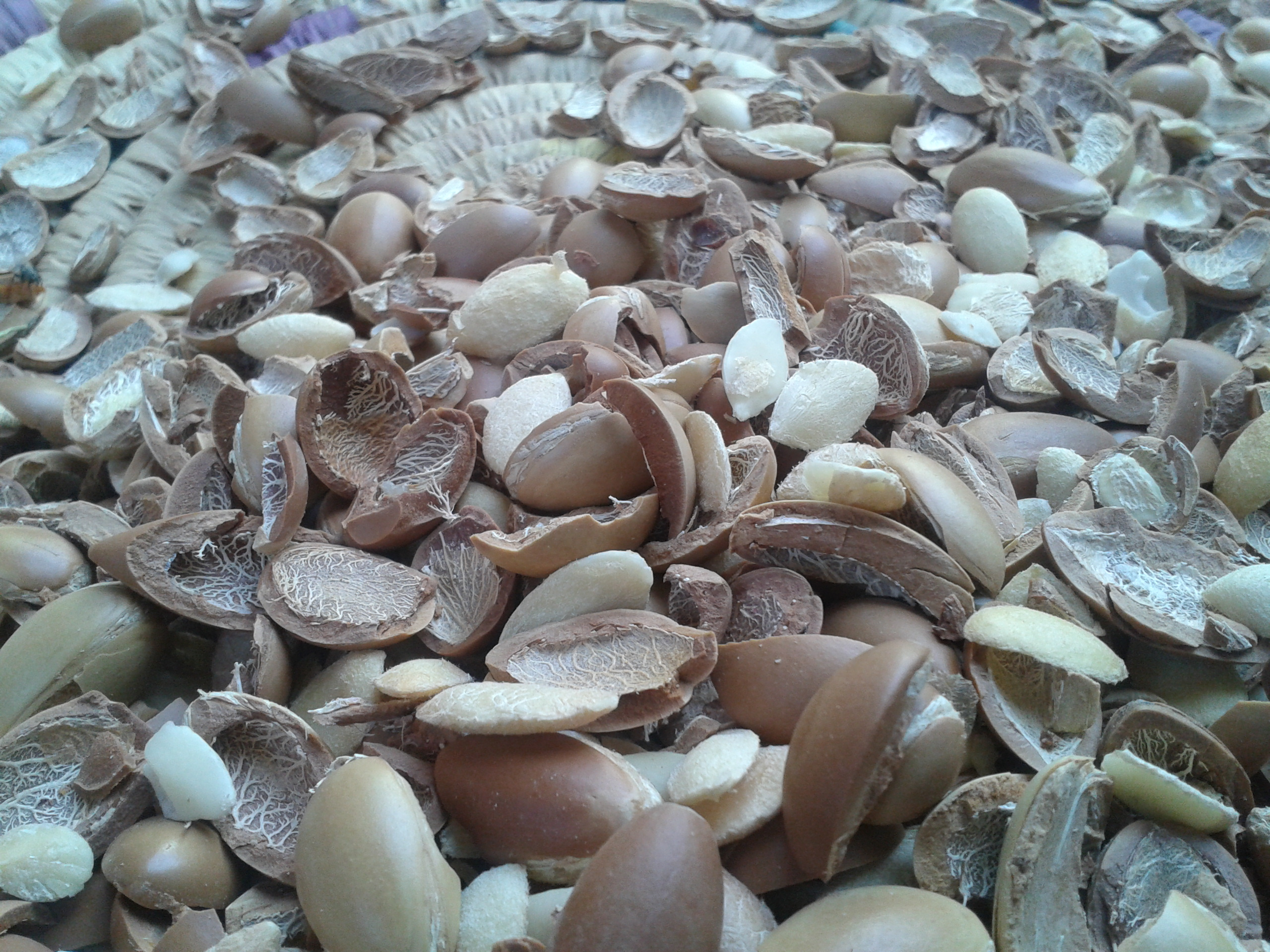 Les noyaux des fruits de l arganier sont très durs par contre les amandons qui sont cachés à leurs intérieurs sont fragils